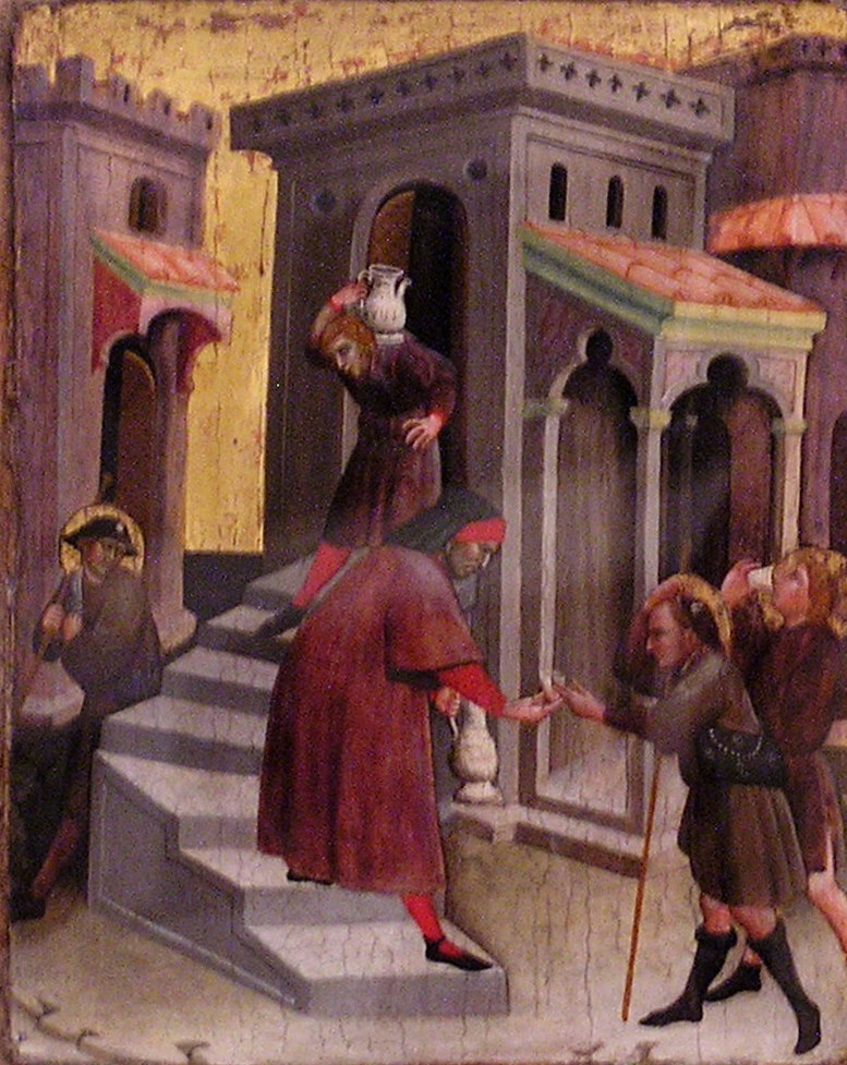 Sono io l'autore della foto. Rappresenta una tempera su tavola di Olivuccio di Ciccarello conservata nella Pinacoteca Vaticana. Fa parte della serie delle Opere di misericordia ed è intitolata: "Dare da bere agli assetati". Era precedentemente attribuita a Carlo da Camerino. La foto non è purtroppo di buona qualità. Se ne avete una migliore sostituitela (nella Pinacoteca Vaticana è consentito fotografare le opere esposte).--Gep (msg) 18:23, 18 feb 2012 (CET)